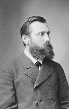 Johannes Conrad (Nationalökonom)